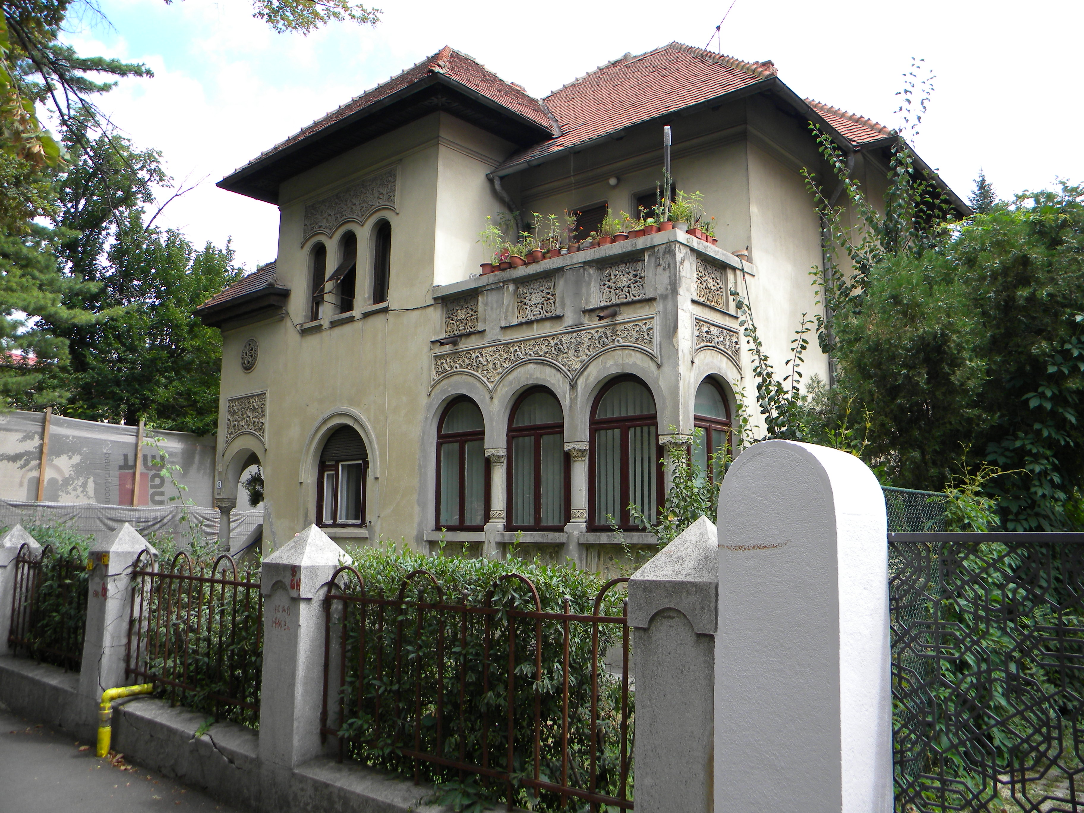 Imobil pe Bd. Aviatorilor, nr. 42, Bucuresti sect. 1